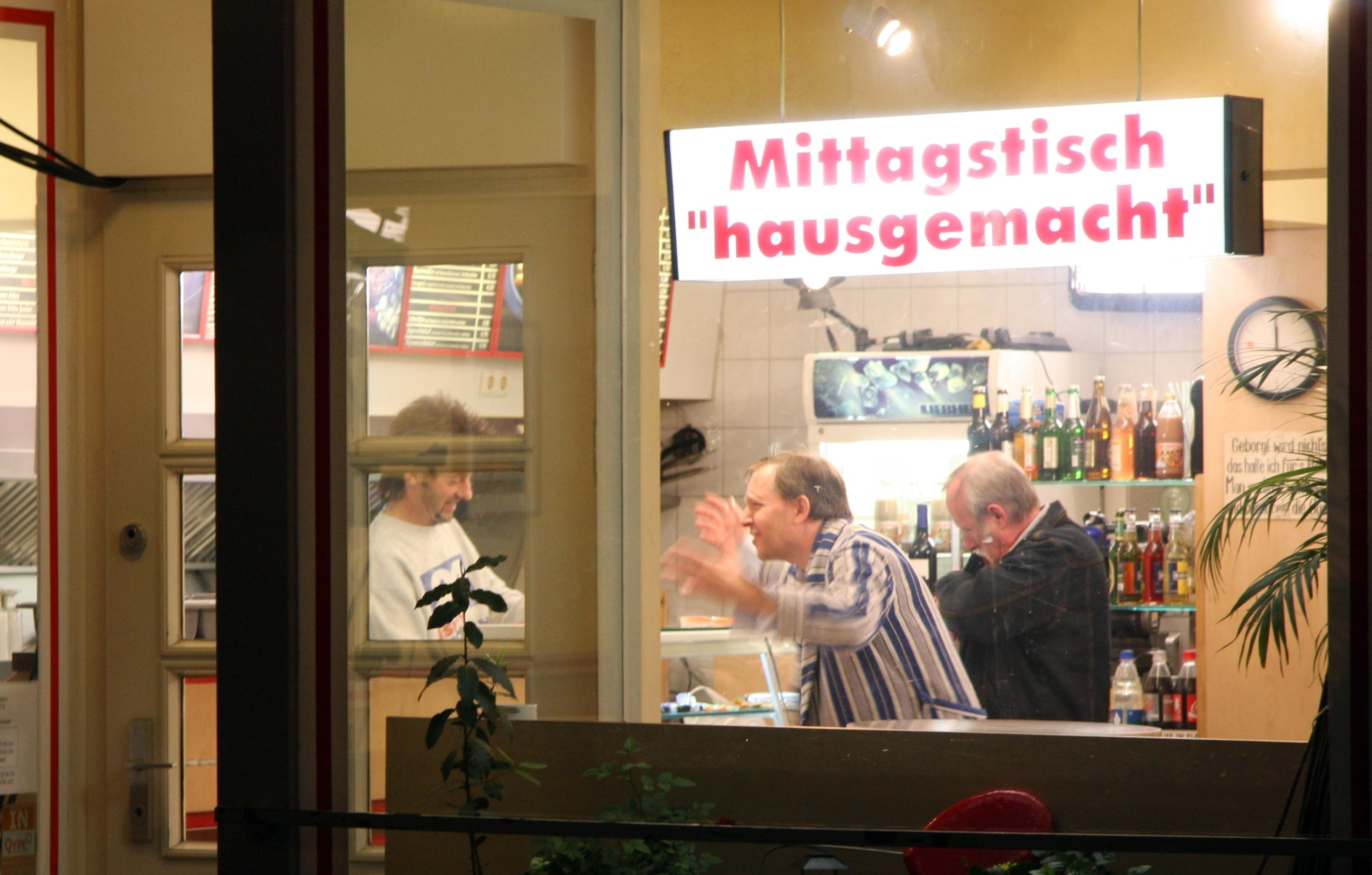 Dittsche bei der Chefvisite in der Eppendorfer Grill-Station in Hamburg, Hoheluft-West. Gast: Peter Merz.